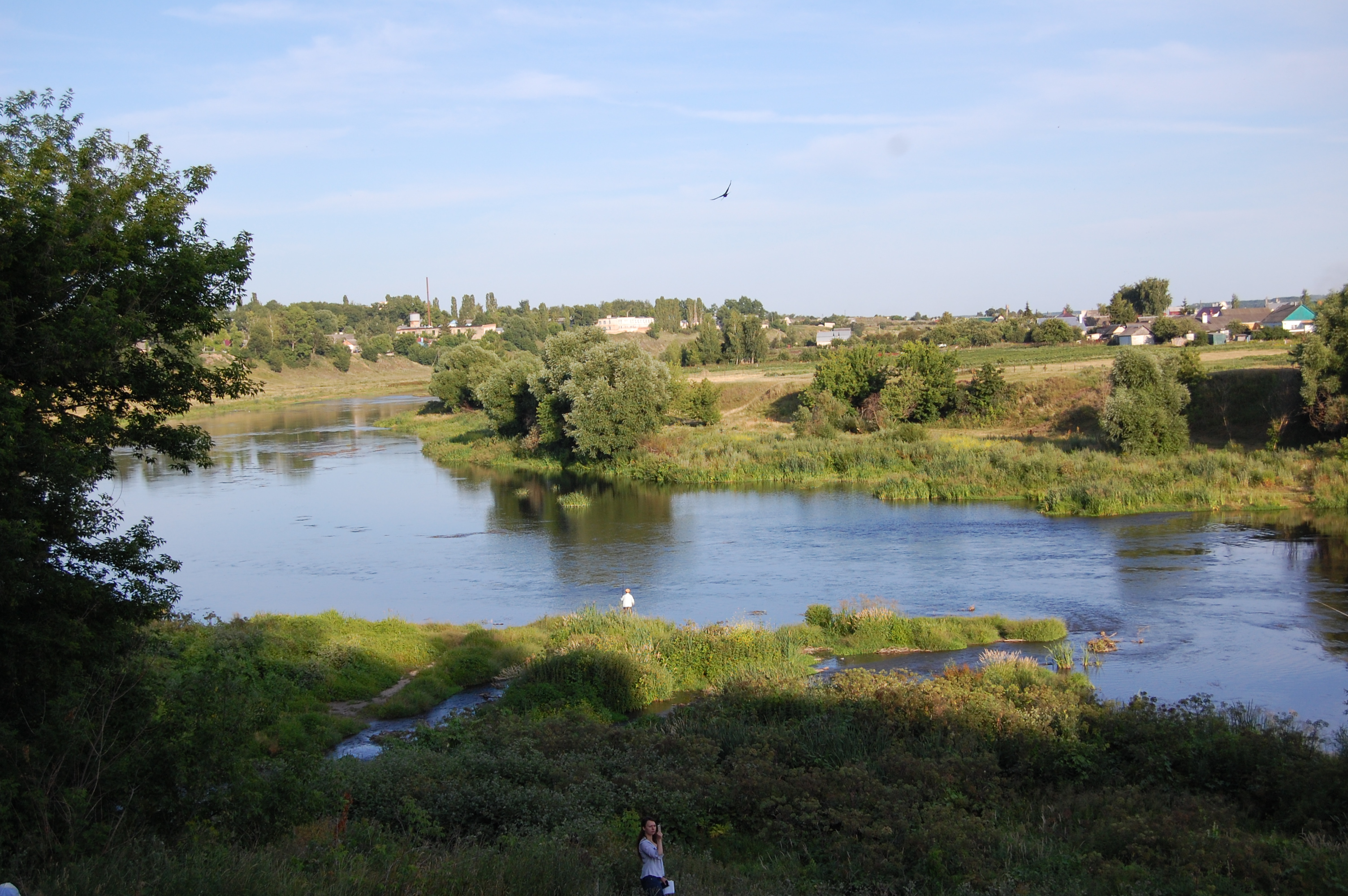 Река Сосна (г. Ливны, Орловская обл.)